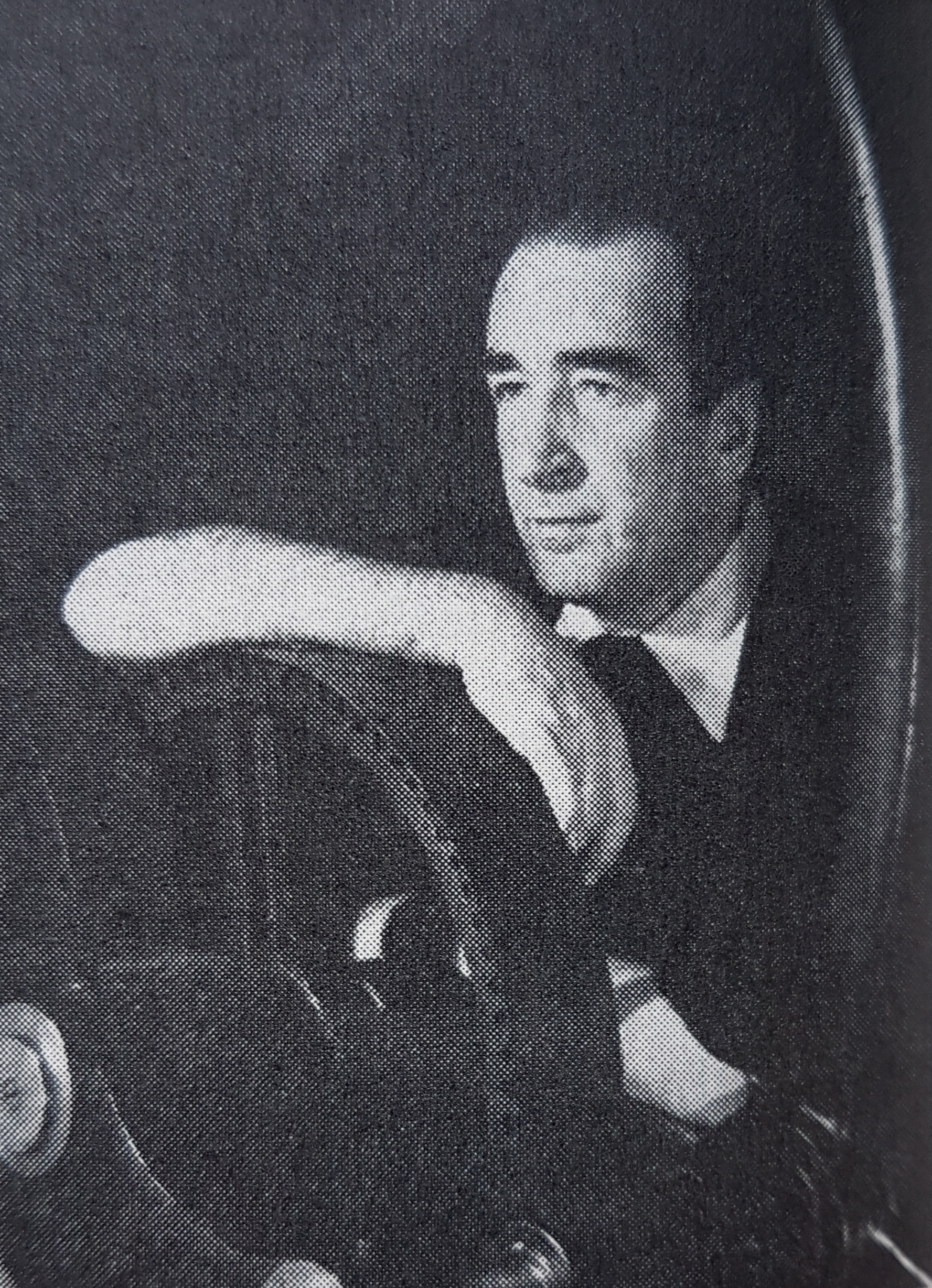 Jurgen von Konow , avfotograferad porträttbild från Allhems Svenskt konstnärslexikon.